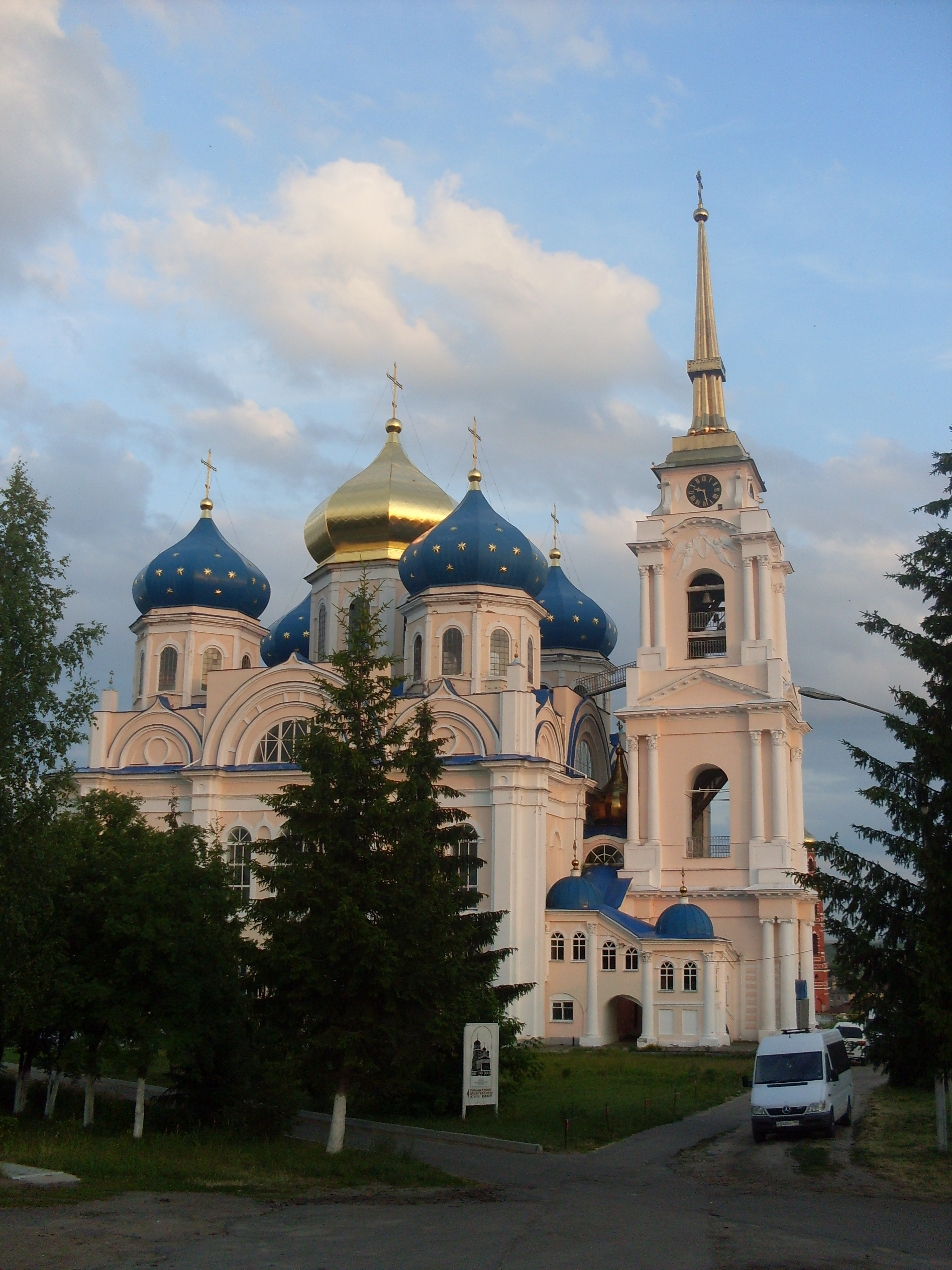 Спасо-Преображенский собор: улица Красная горка, 1, Болхов, Болховский район, Орловская область